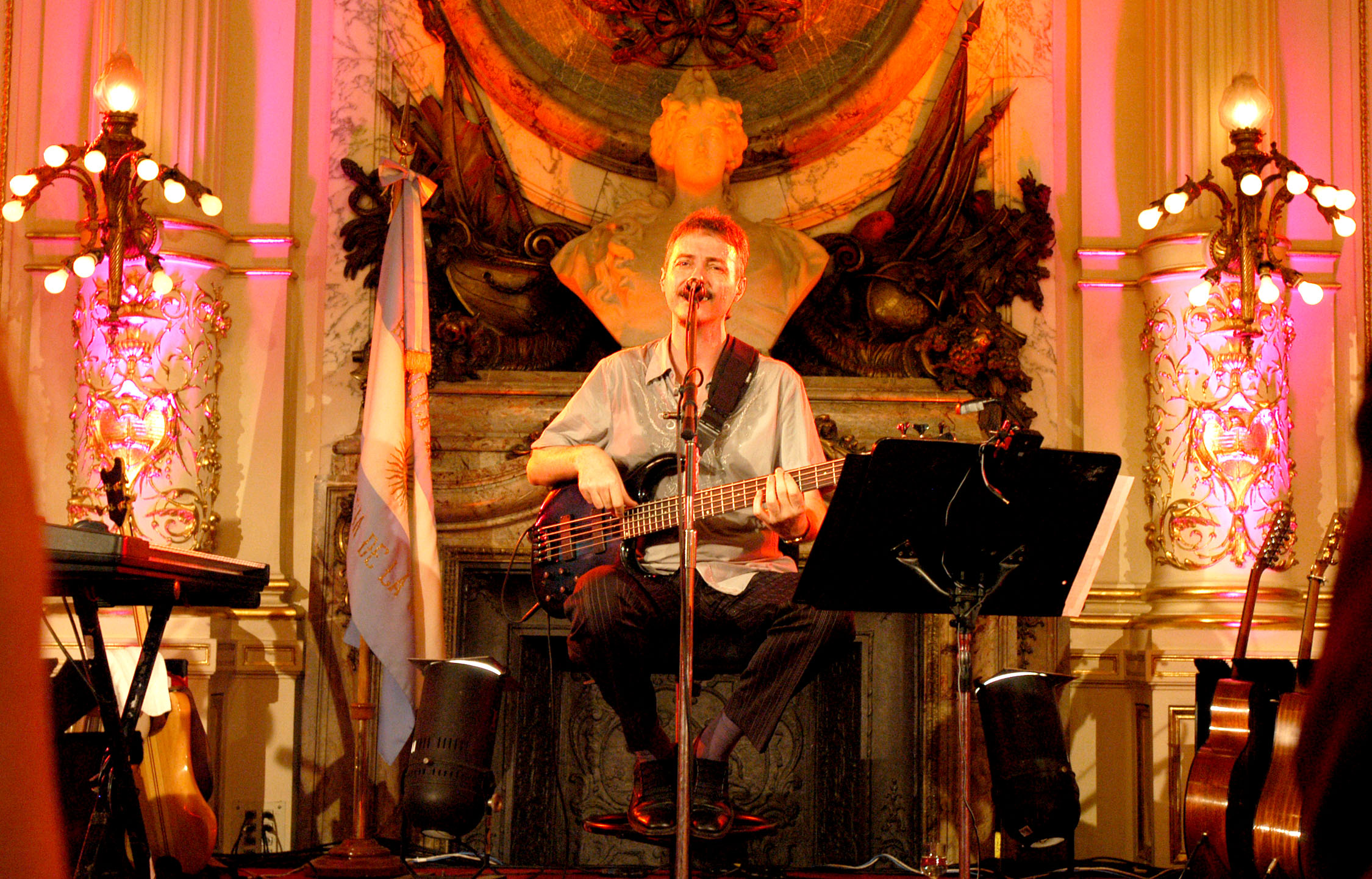 Pedro Aznar. En la Casa Rosada. Buenos Aires. Argentina. 6 de mayo de 2005. foto oficial